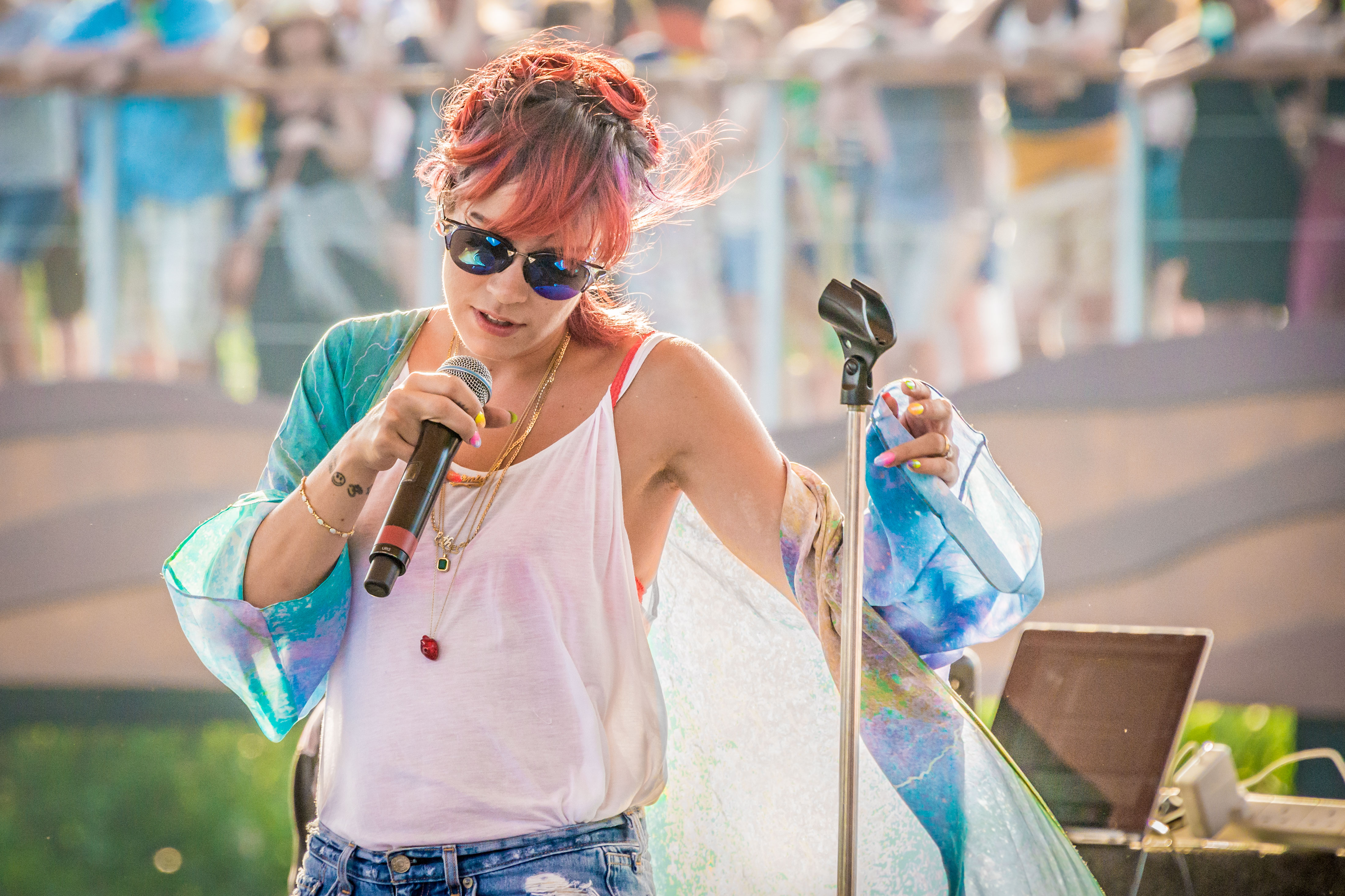 Latitude 2014